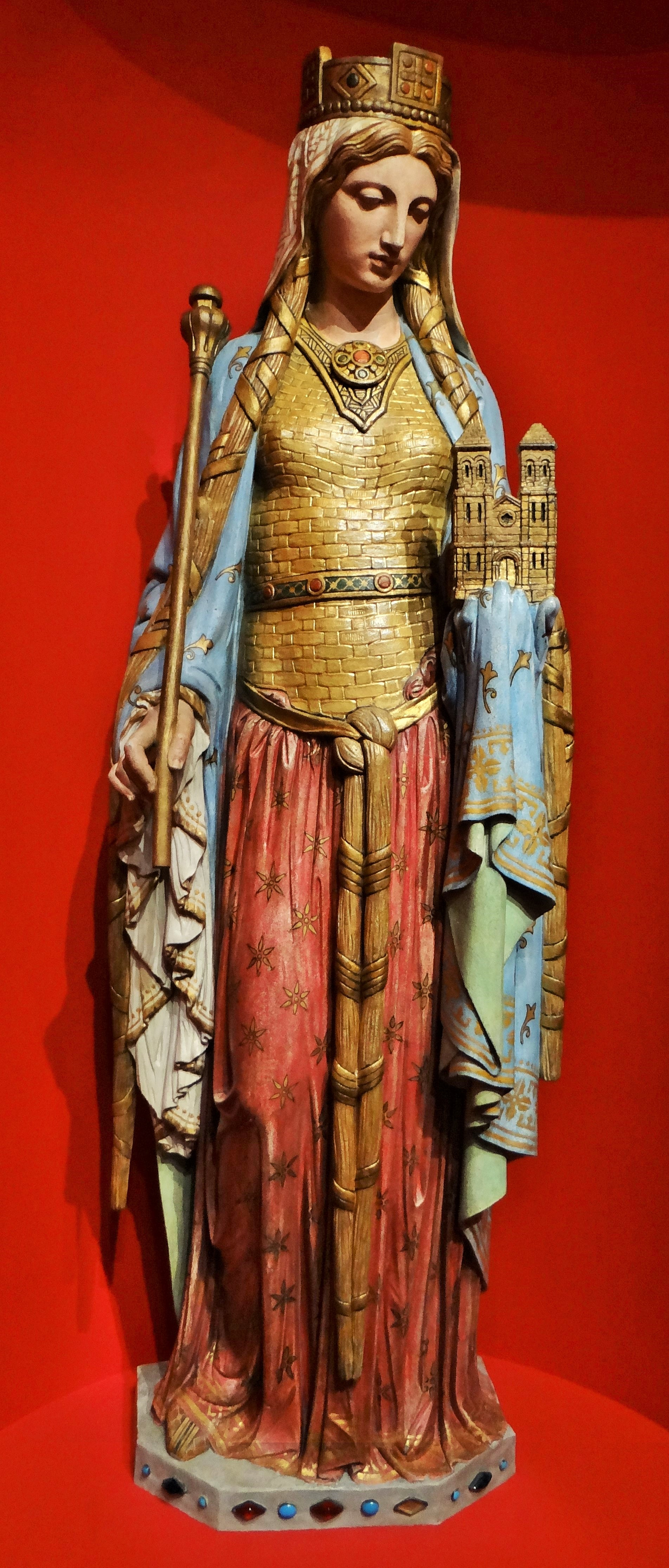 Sainte Clothilde, 1854, pierre peinte et dorée, verre, émail, Eugène Guillaume, sculpteur, Alexandre Denuelle, peintre Paris, conservation des oeuvres d'arts religieuses et civiles de la ville de Paris et Direction des Affaires culturelles d'Ile de France, Église Sainte-Clothilde, Paris COA-CL09/71